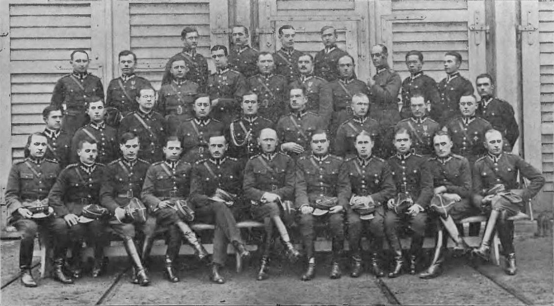 Korpus oficerski 5 Lwowskiego Pułku Artylerii Lekkiej (1928)